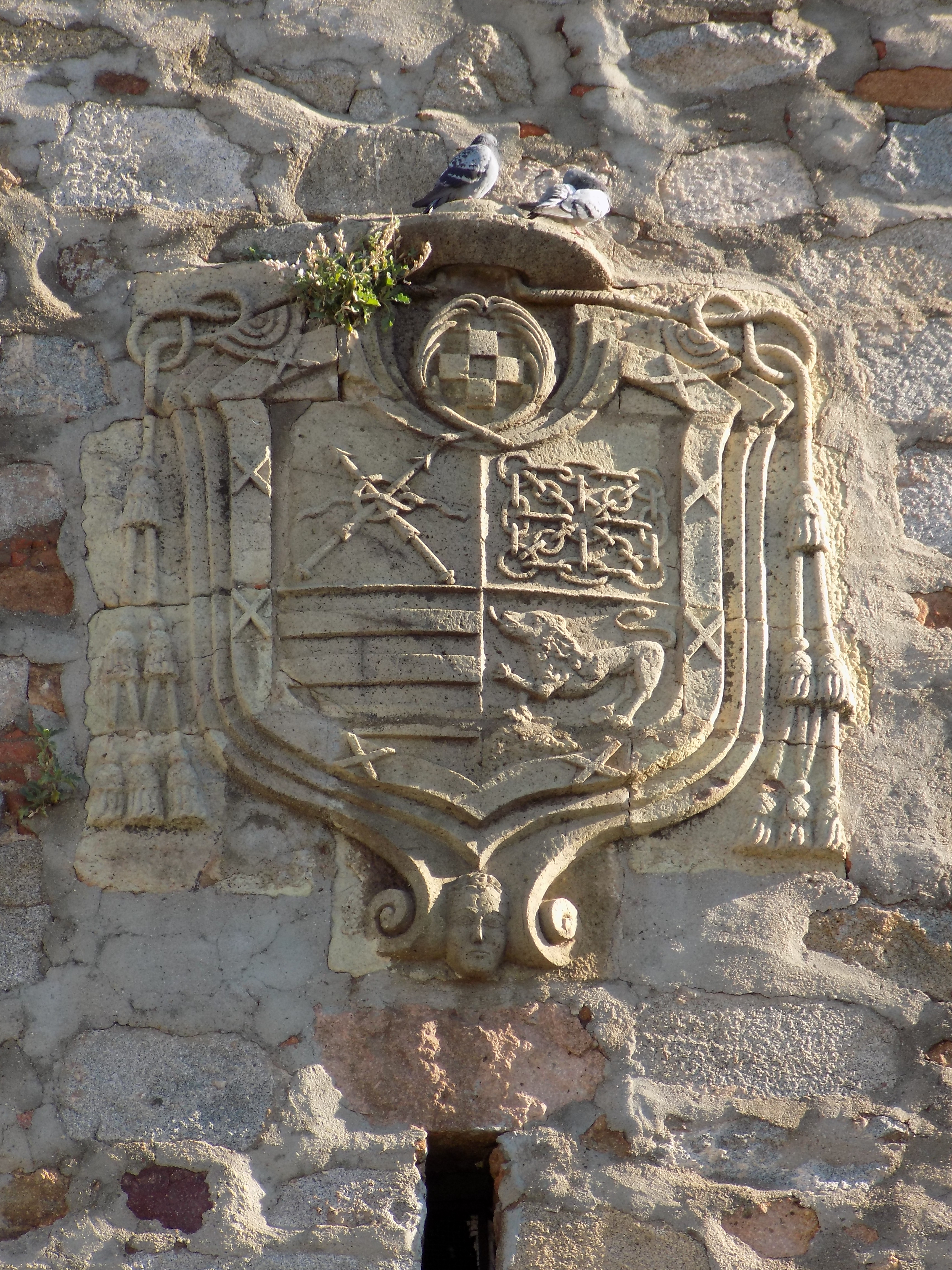 Escudo del prelado Baltasar Yusta Navarro, que fue obispo de Córdoba, en la torre de la iglesia de San Miguel Arcángel de Villanueva de Córdoba, provincia de Córdoba, (Spain).